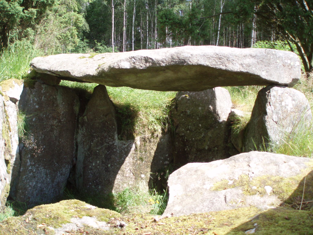 Tolarpsgånggriften, Halmstads kommun, Halland, Sverige.